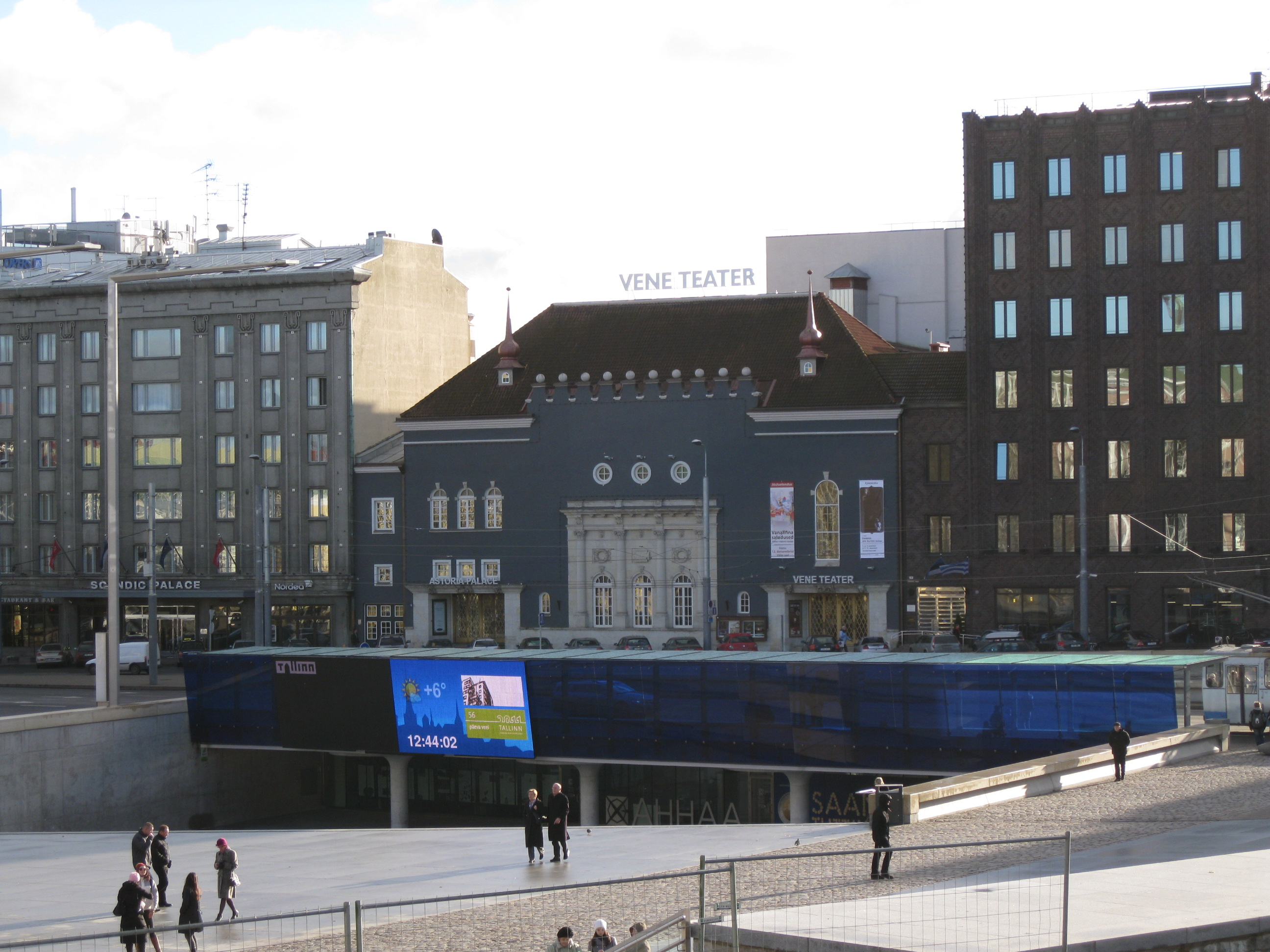 Русский театр в Таллине, Эстония